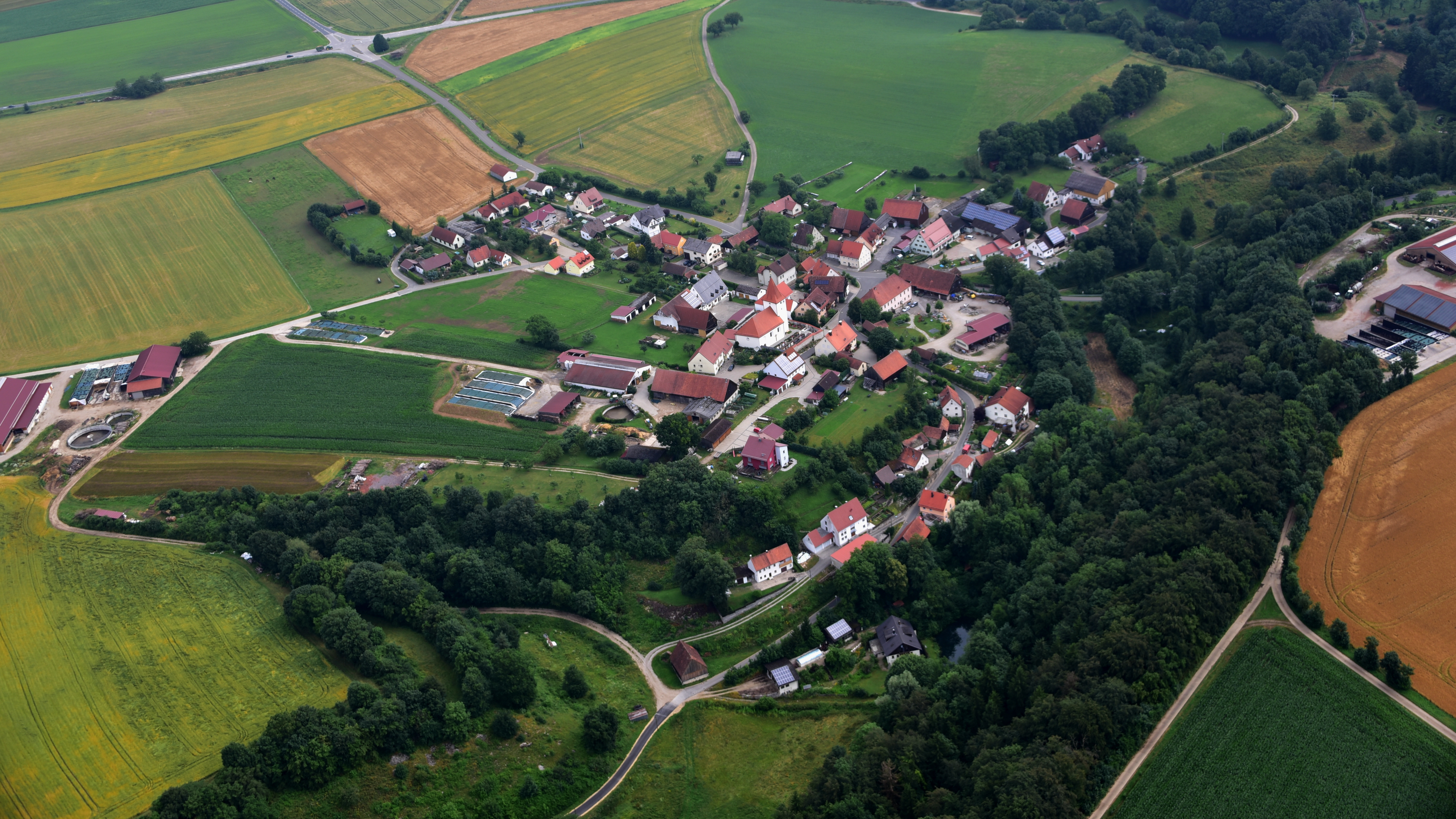 Deinschwang, Luftaufnahme (2016)